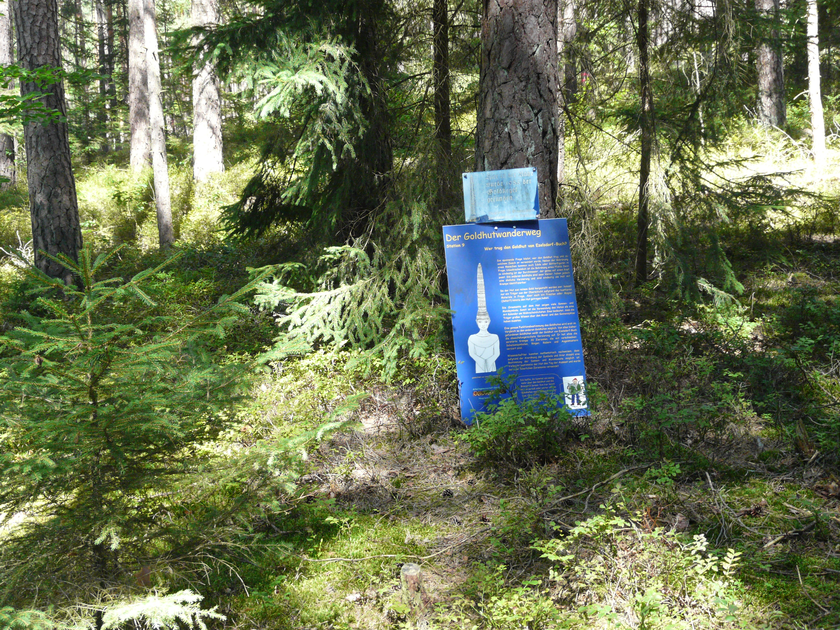 Der im Wald gelegene Fundort des Goldblechkegels von Ezelsdorf-Buch.